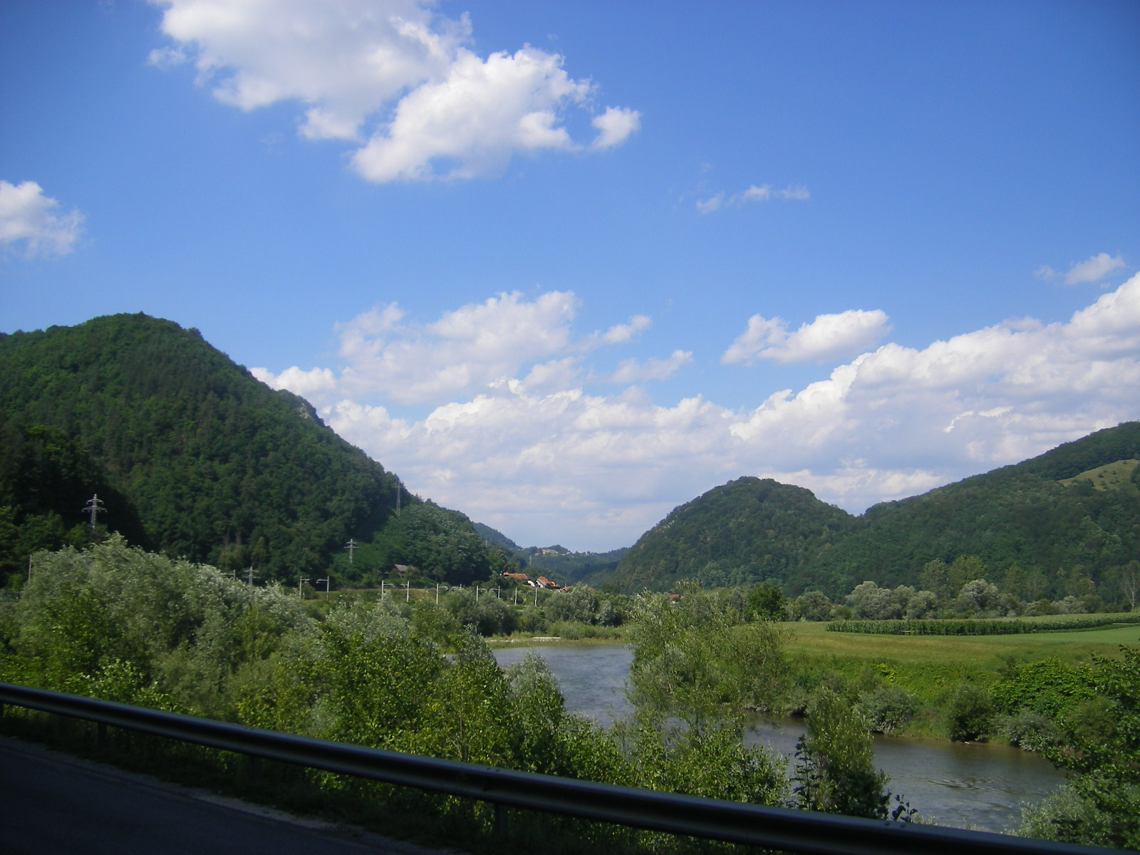 Landscape between Celje and Laško (Savinja Valley)